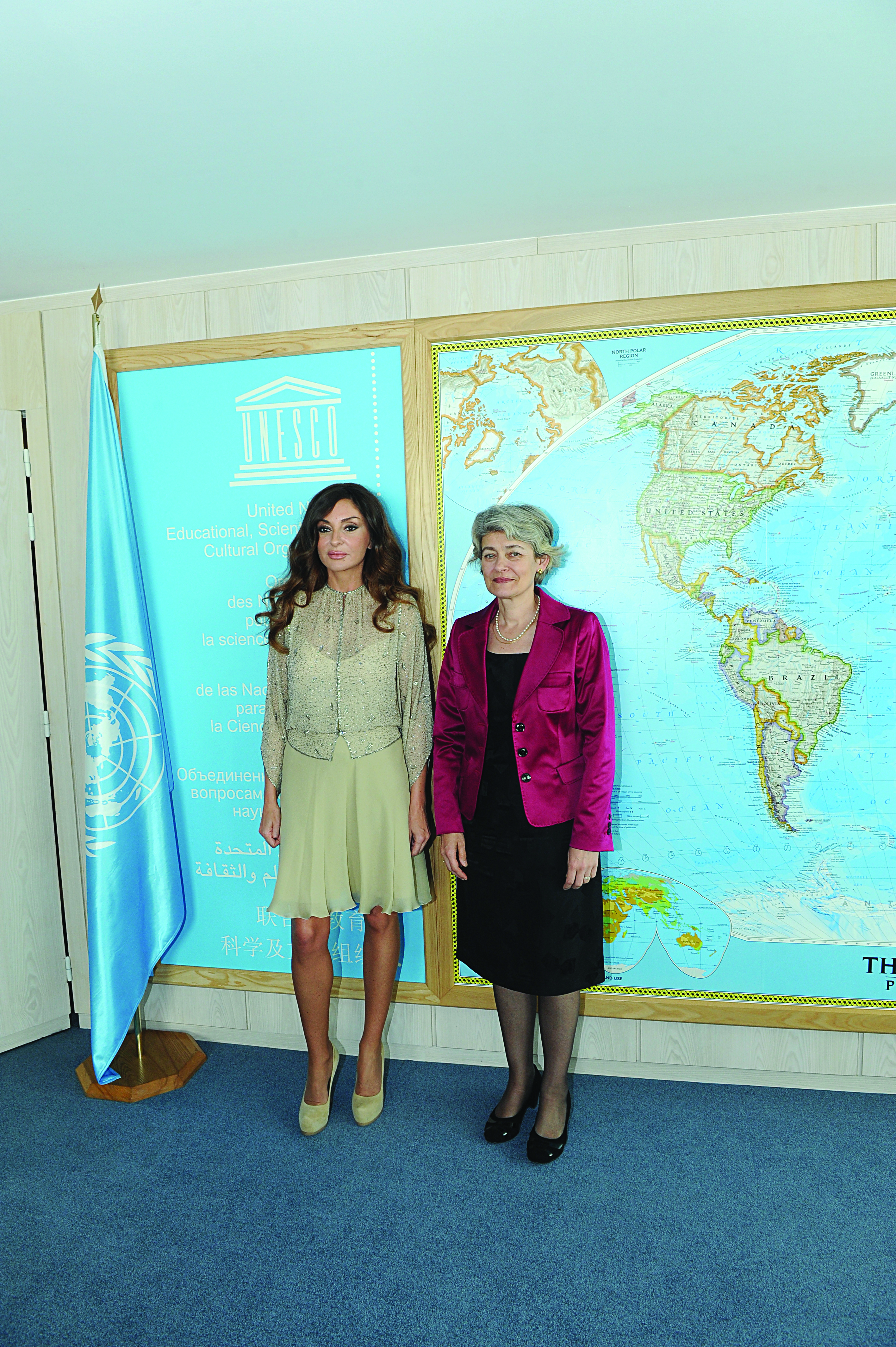 Heydər Əliyev Fondunun prezidenti, UNESCO-nun xoşməramlı səfiri Mehriban Əliyevanın UNESCO-nun baş direktoru İrina Bokova ilə görüşü. Paris, 19 aprel 2011-ci il.